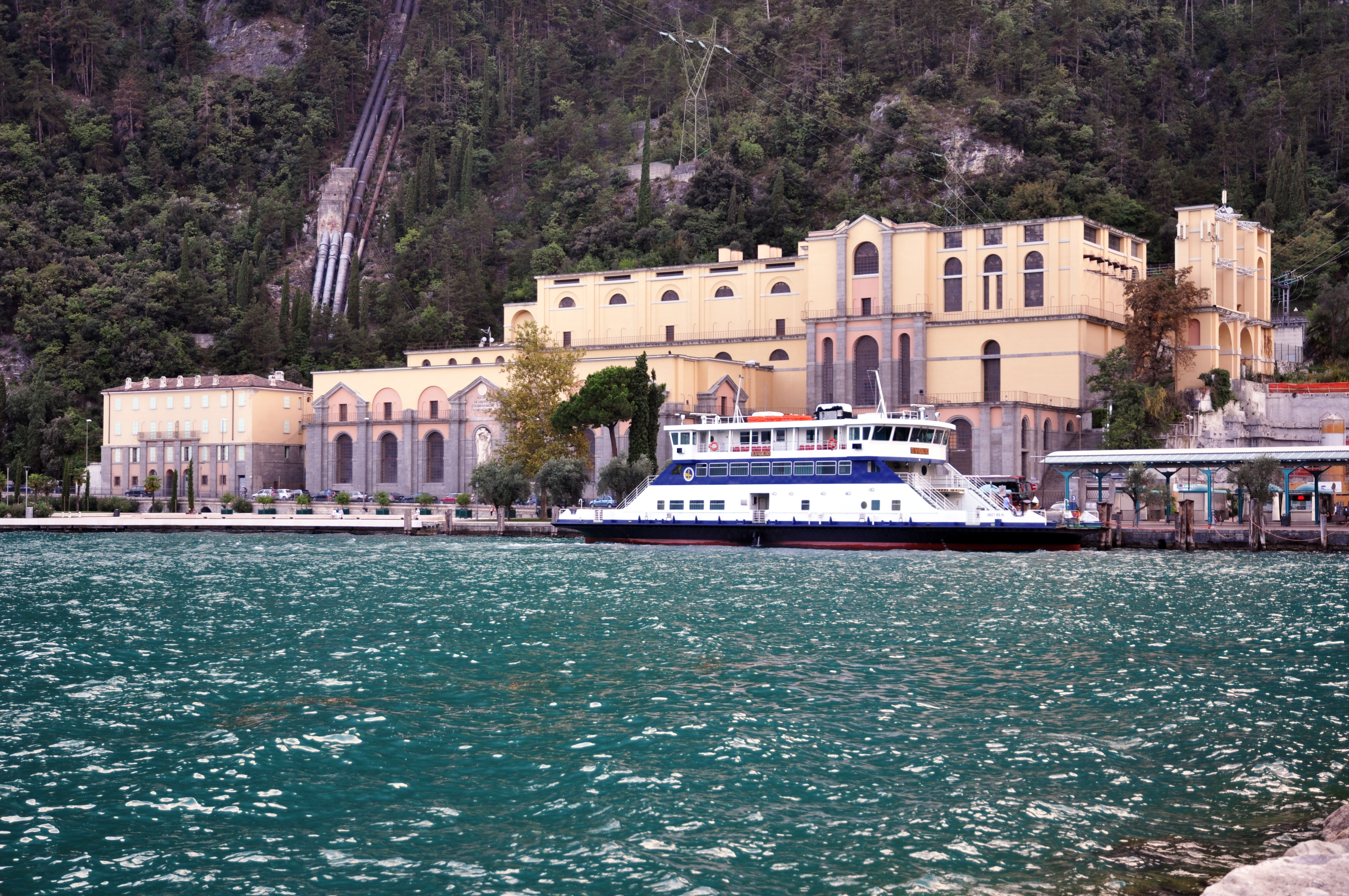 Centrale Idroelettrica del Ponale, Kraftwerkszentrale in Riva del Garda 1928-1931 erbaut. Architekt: Giancarlo Maroni